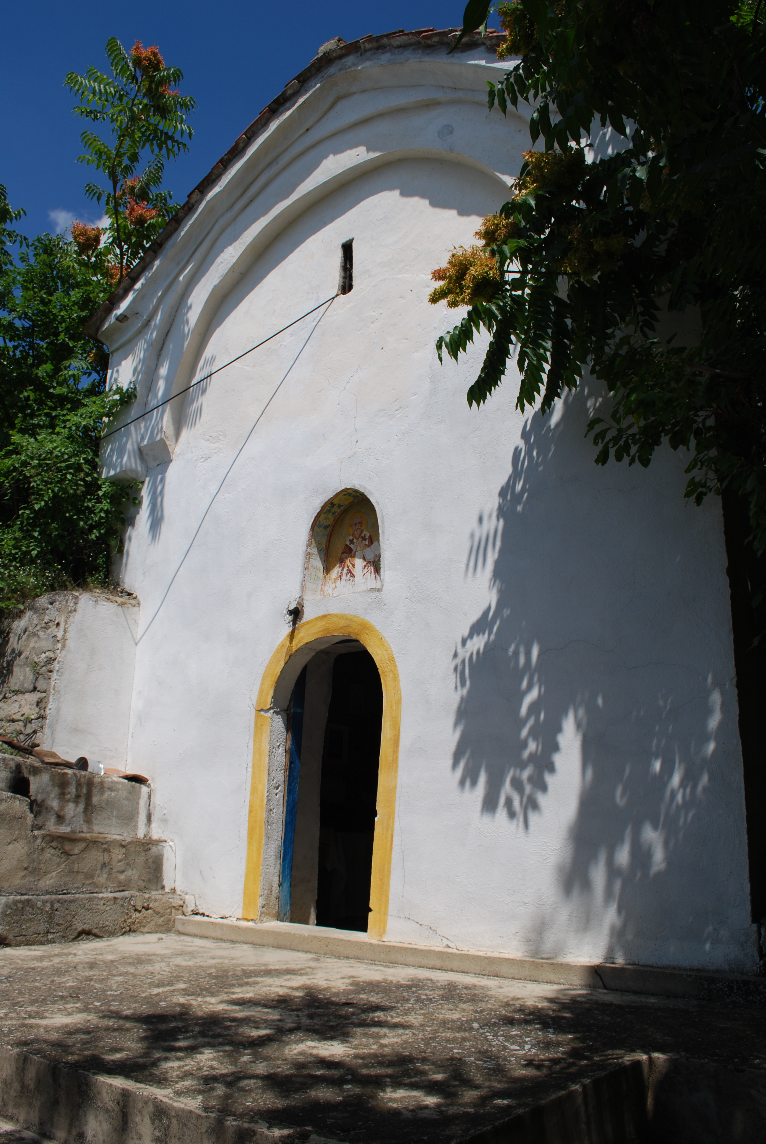 Црквата Св. Никола во с. Винце, Куманово, Македонија